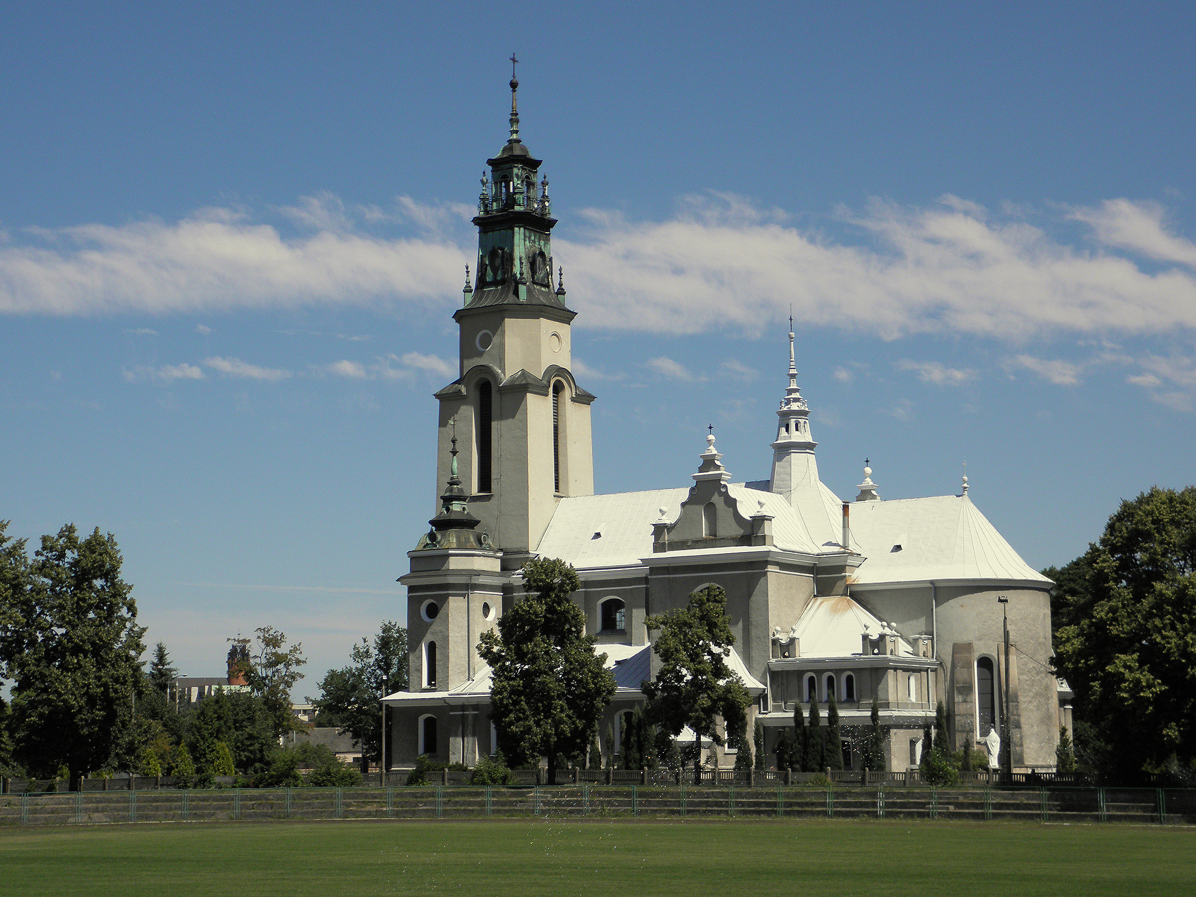 Pionki - kościół św.Barbary 05.1988.